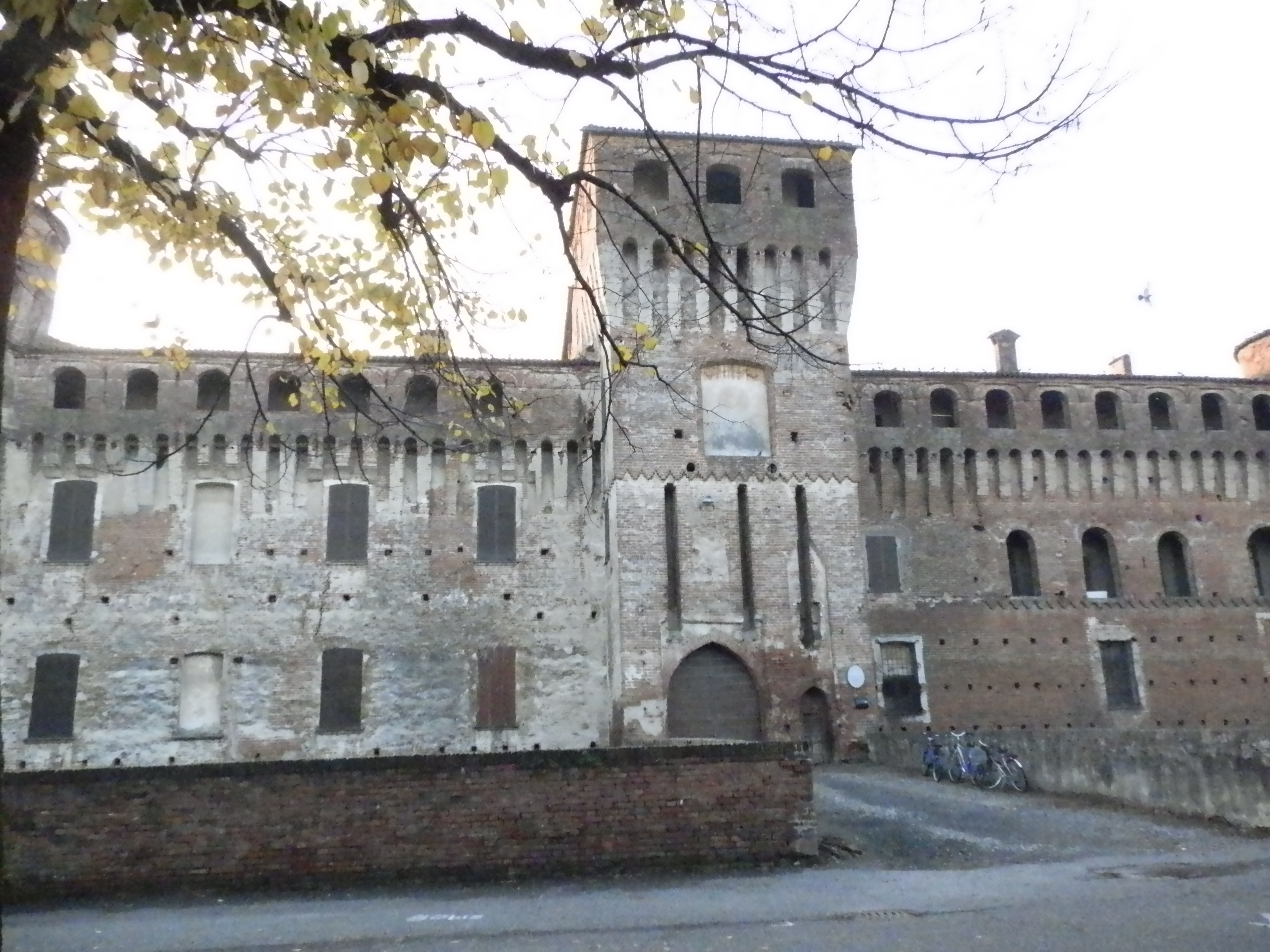 Celebre per i suoi monumenti e le sue opere d'arte, tra cui spiccano il castello Pallavicino Casali